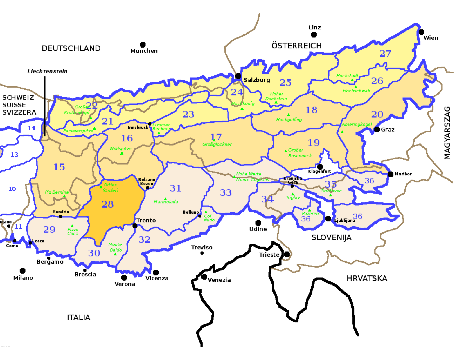 Alpi Orientali secondo la SOIUSA con evidenziate le Alpi Retiche Meridionali